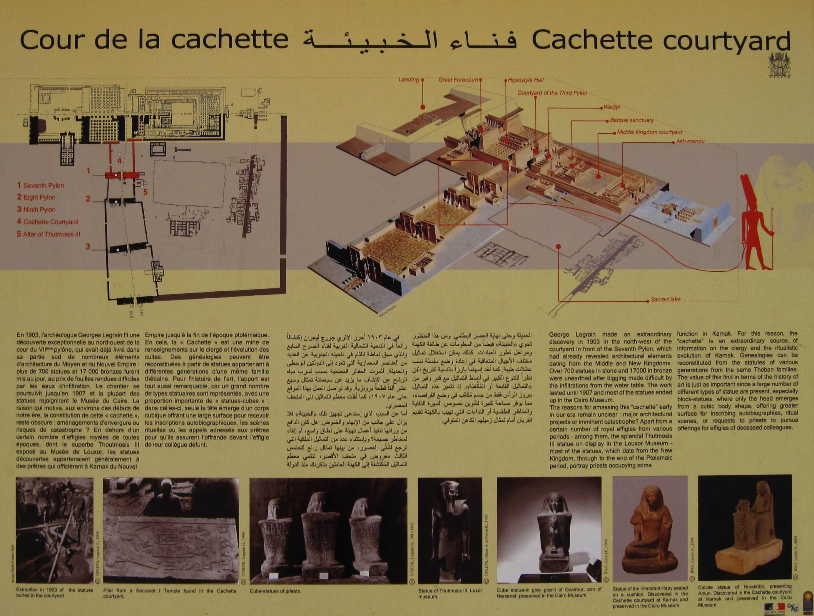 Informationstafel im Tempel von Karnak nördlich Luxor, Ägypten